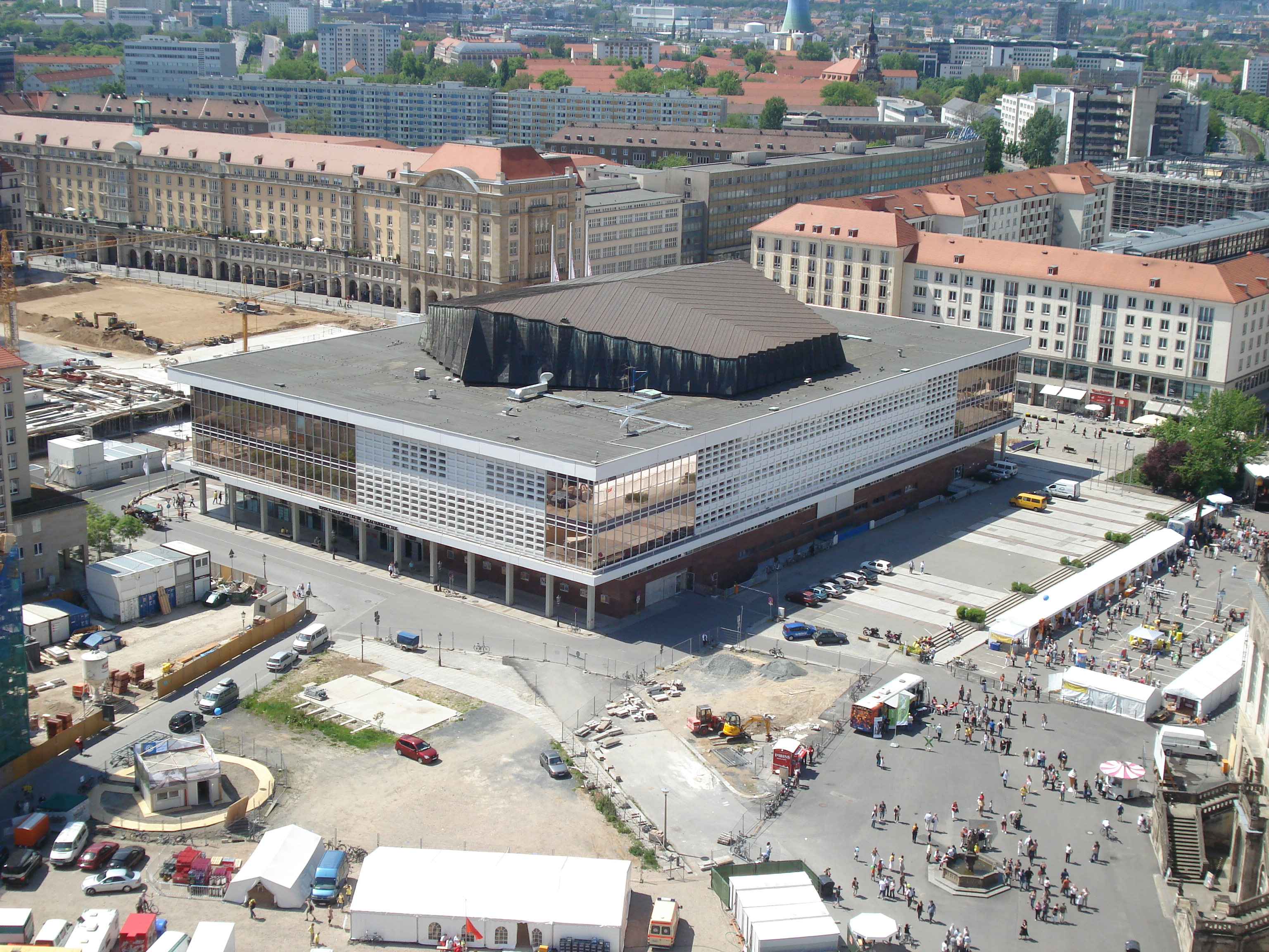 Kulturpalast Dresden, seen from the Frauenkirche